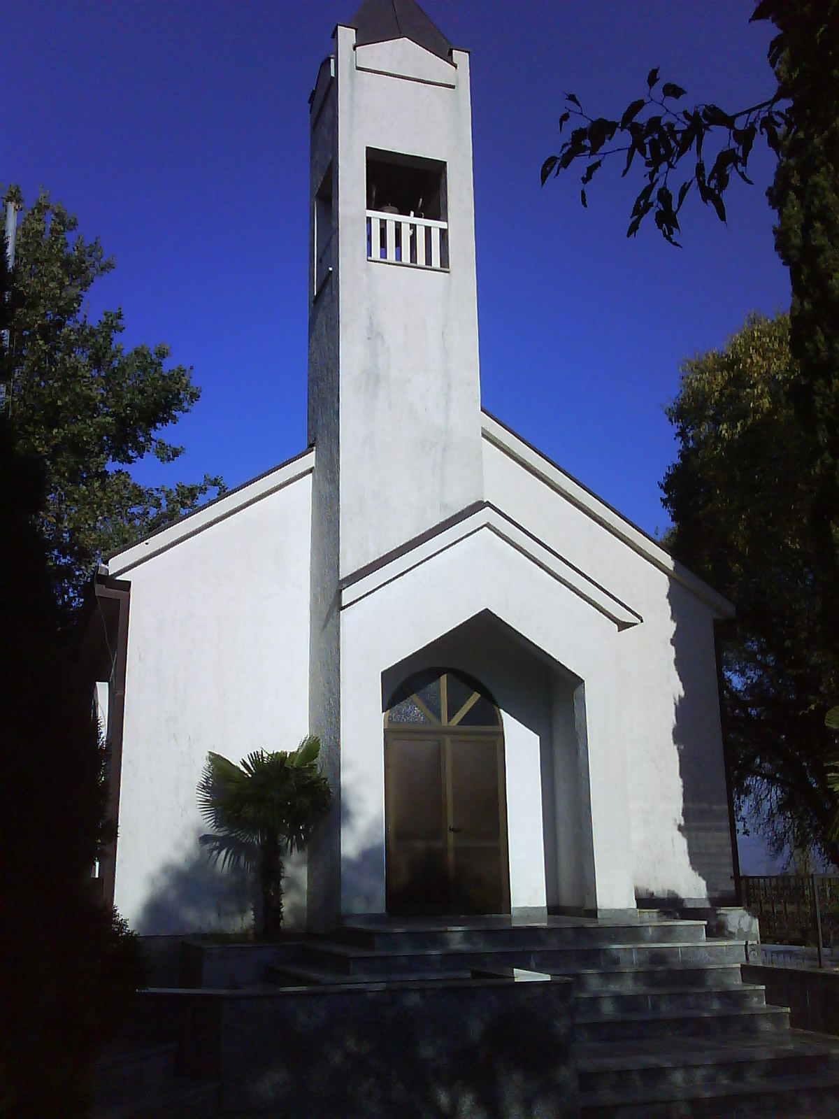 Crkva sv.Roka